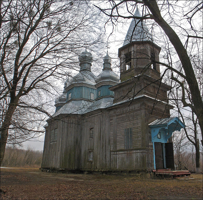 церква Різдва Богородиці в Тулинцях